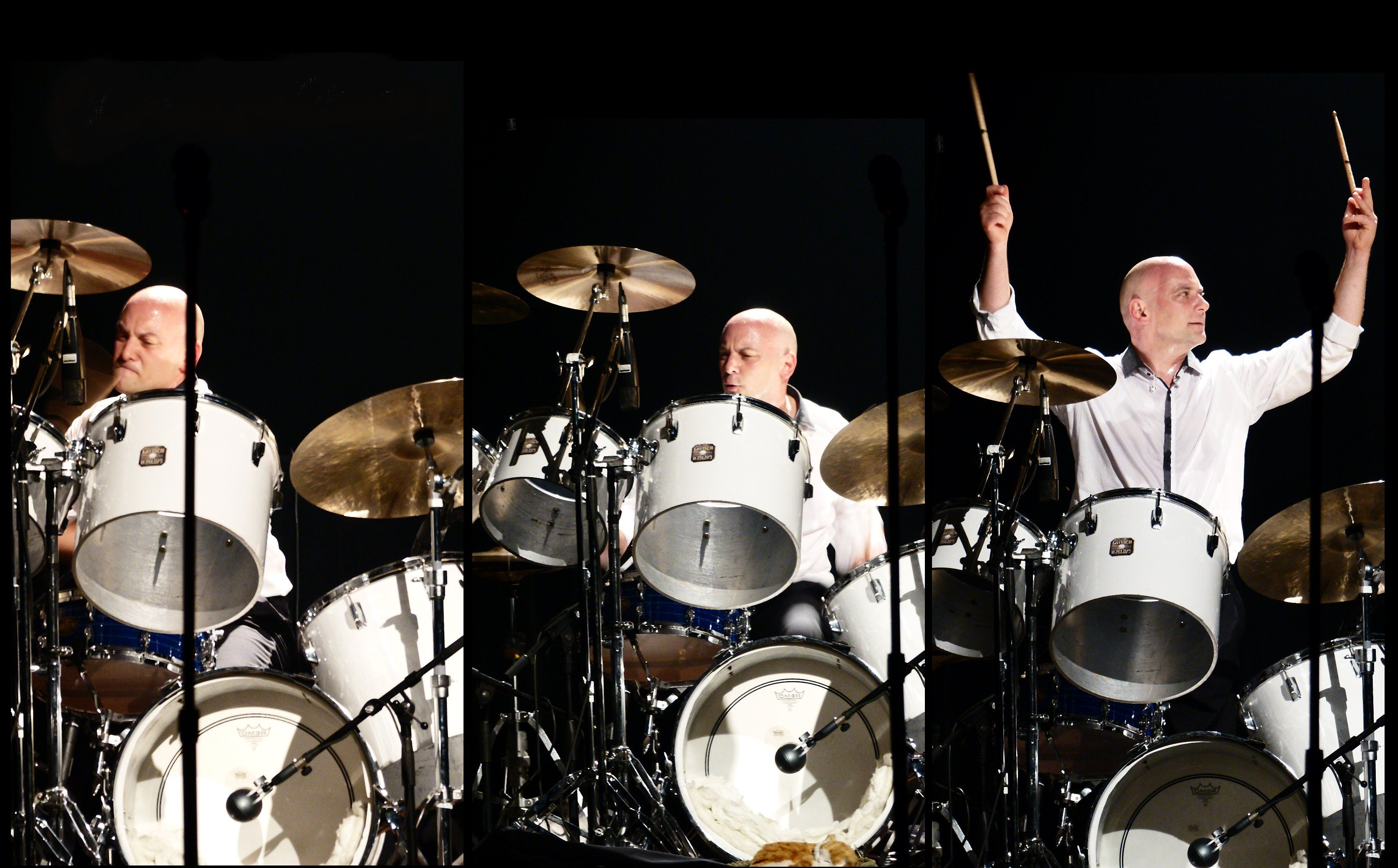 Martin Levac a la batterie